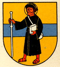 Wappen von Lieu Kanton Waadt Schweiz